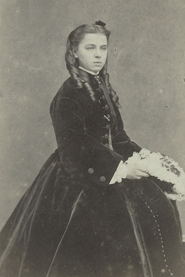 Принцесса Тереза Петровна Ольденбургская (1852—1883)